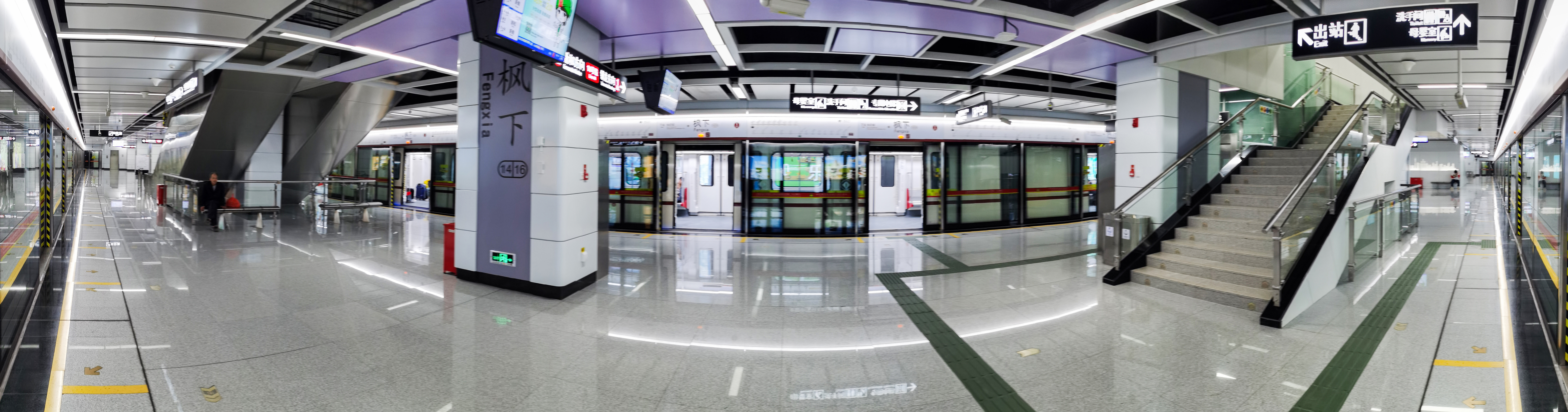 广州地铁枫下站